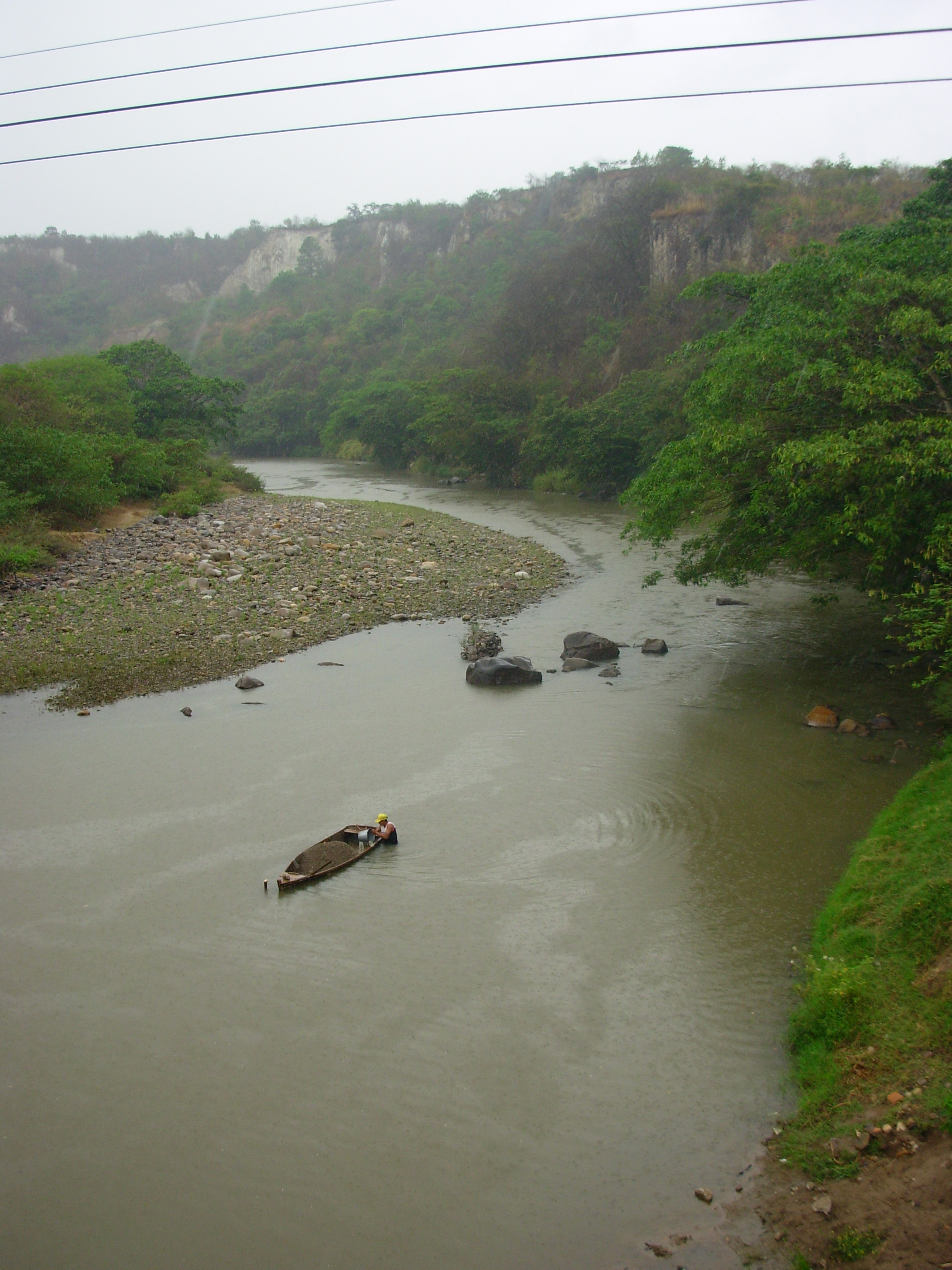 Rio Lempa , cerca de Nueva ocotepeque, Honduras. recolectando arena.